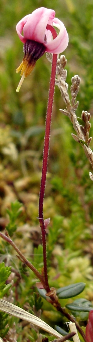 Canneberge